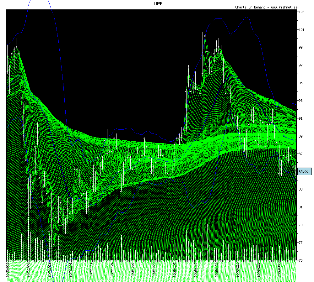 Fishnet chart